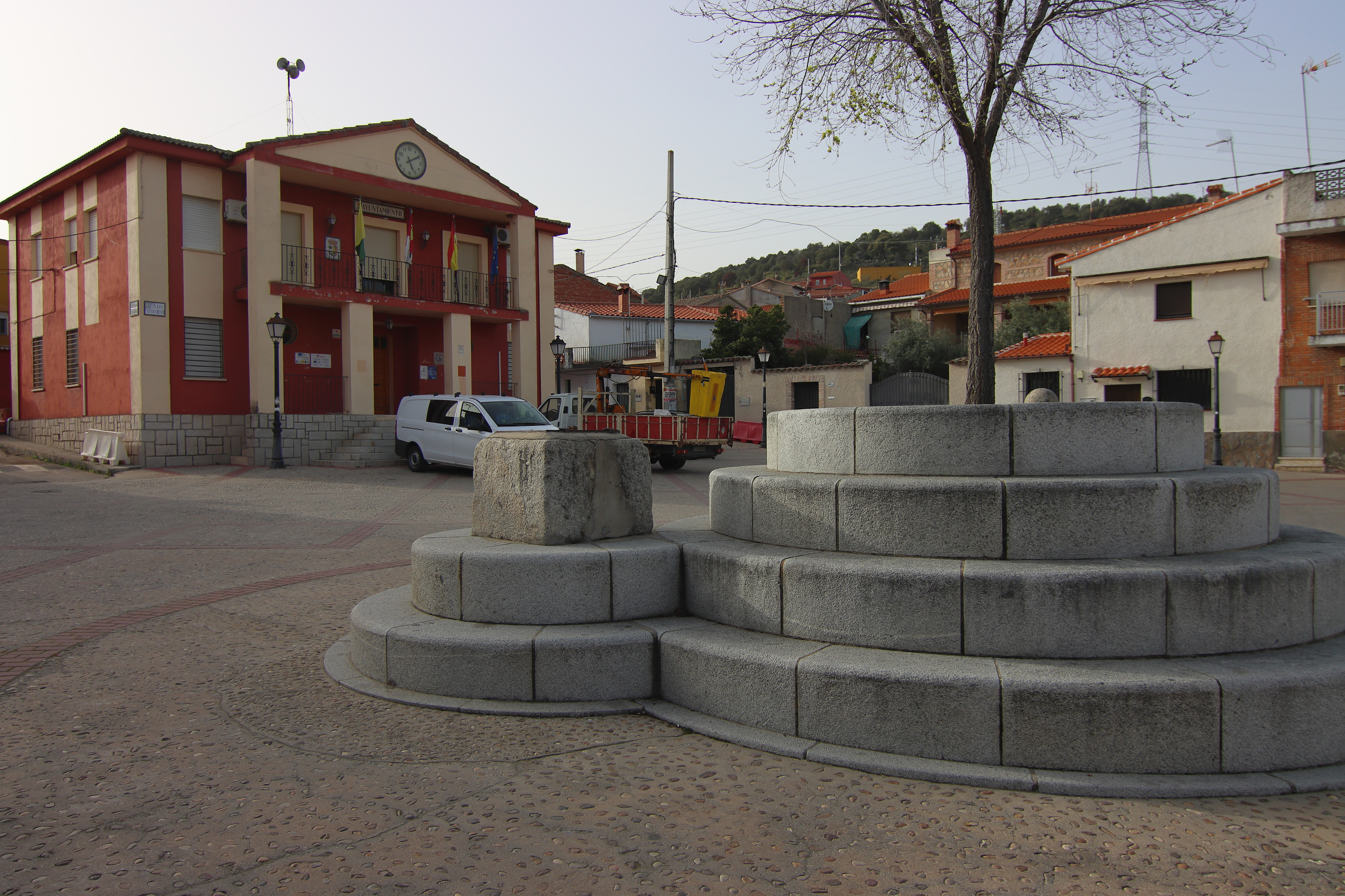 Plaza ayuntamiento, Nuño Gómez, 01